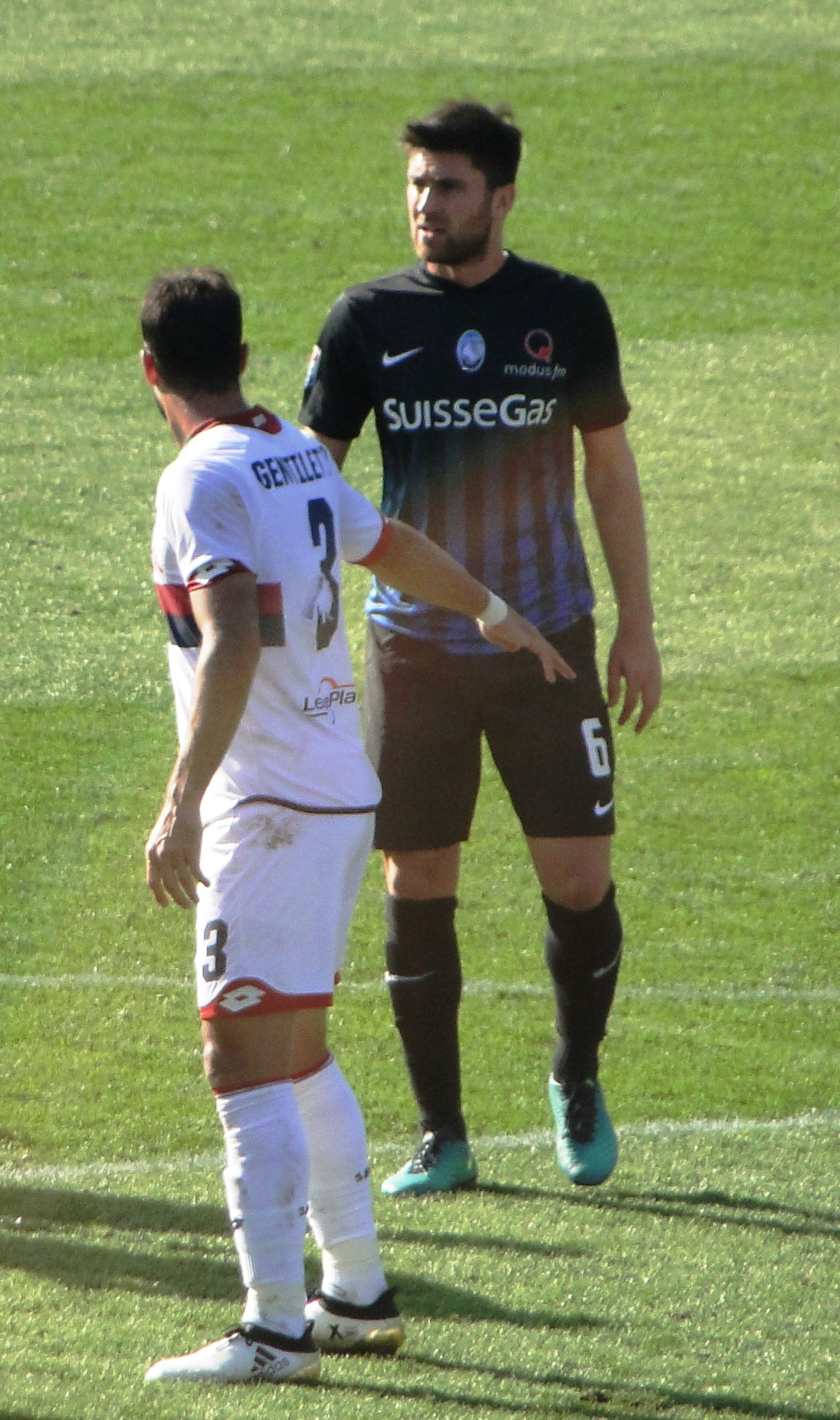 Ervin Zukanović, calciatore bosniaco